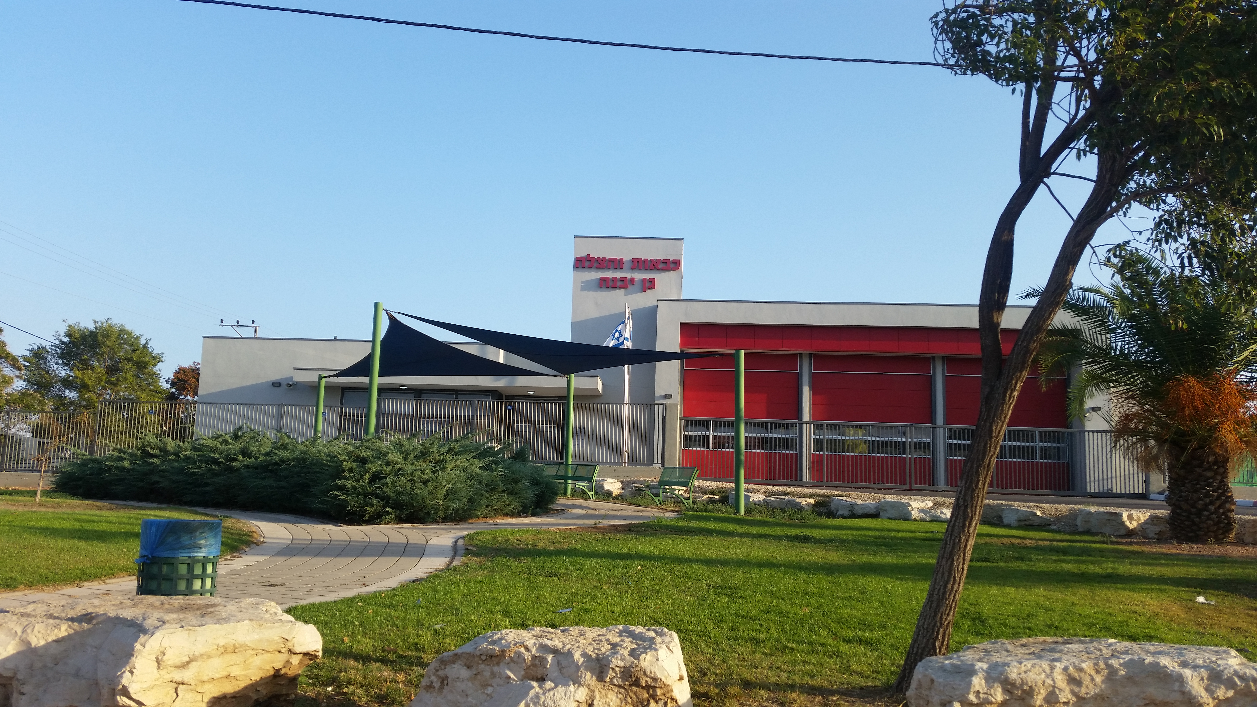 תחנת כבאות והצלה חדשה במושבה גן יבנה